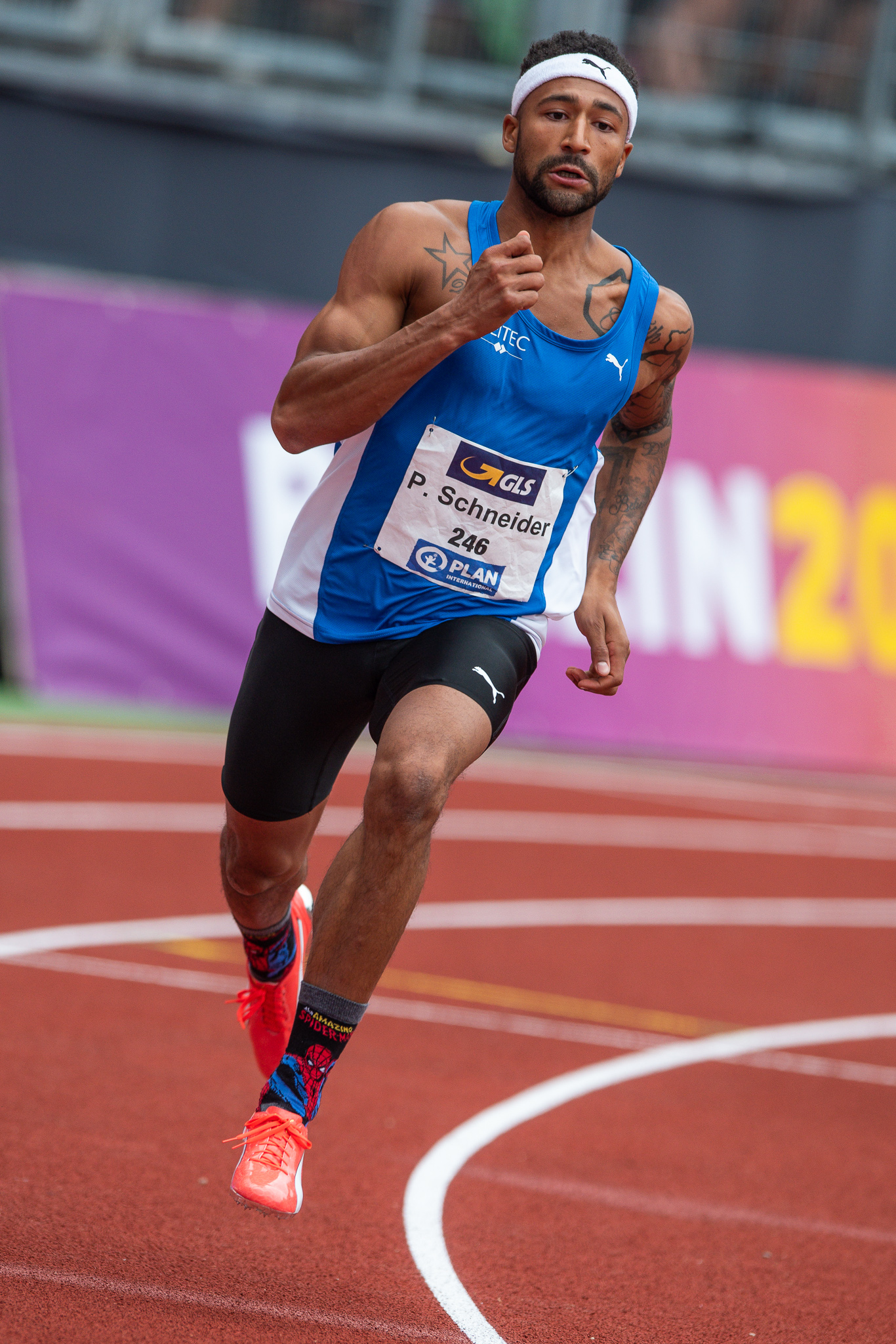 400-Meter-Lauf,DLV,Deutsche Leichtathletik Meisterschaften 2018,Deutscher Leichtathletik-Verband,LAC Quelle,Leichtathletikcentrum Quelle Fürth,Max-Morlock-Stadion,Patrick Schneider